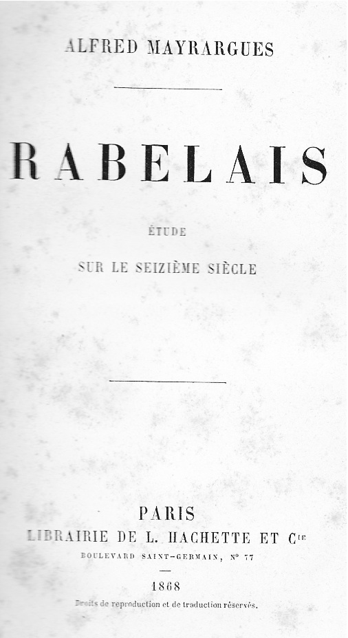 Page de garde du livre Rabelais publié par Alfred Mayrargues chez Hachette en 1868.